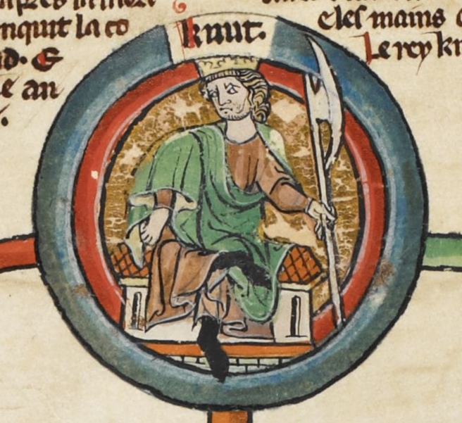 Miniature de Cnut le Grand dans une généalogie royale du XIVe siècle.